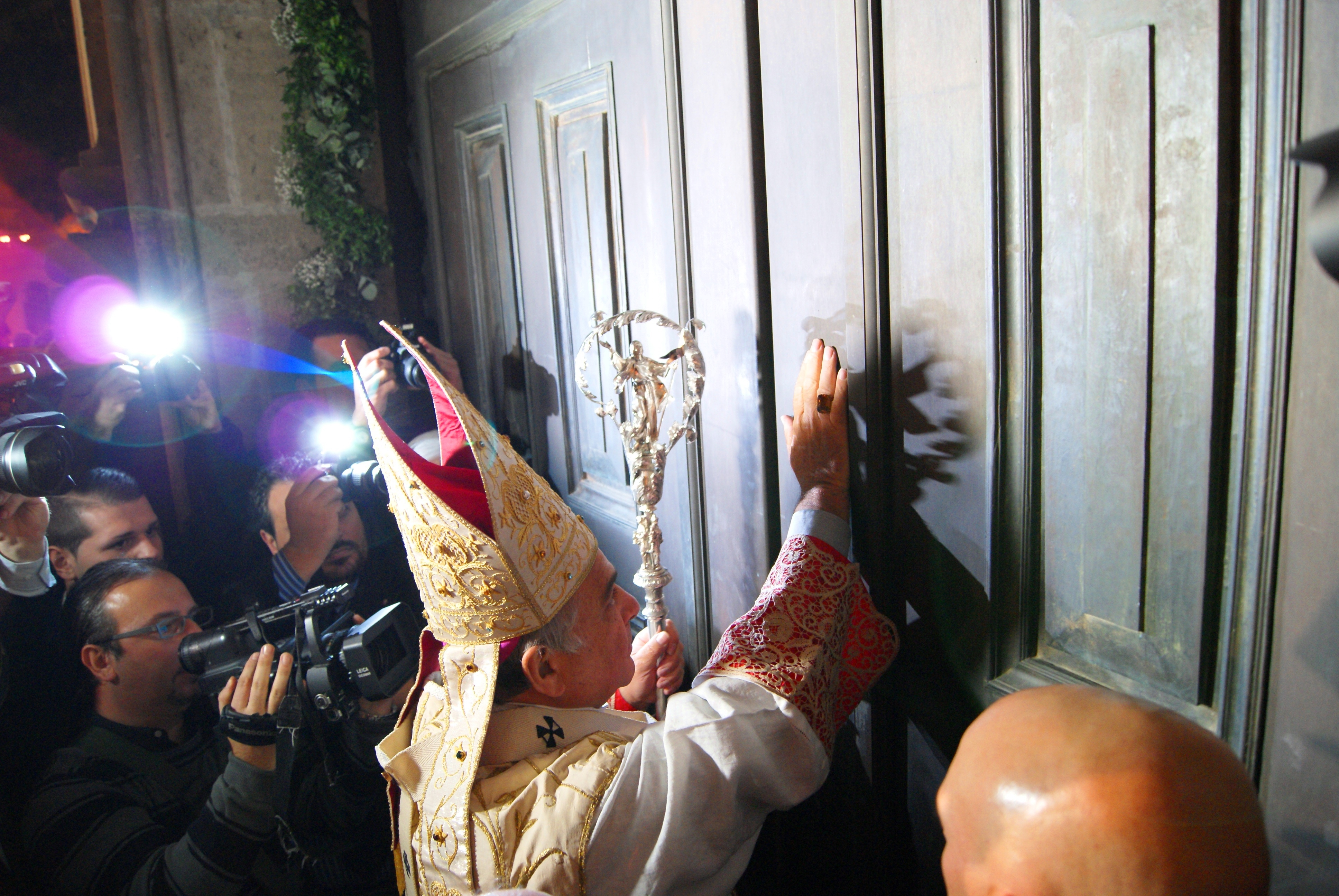 Riapertura del tempio di Santa Barbara alla presenza di Mons. Salvatore Gristina, Arcivescovo metropolita di Catania